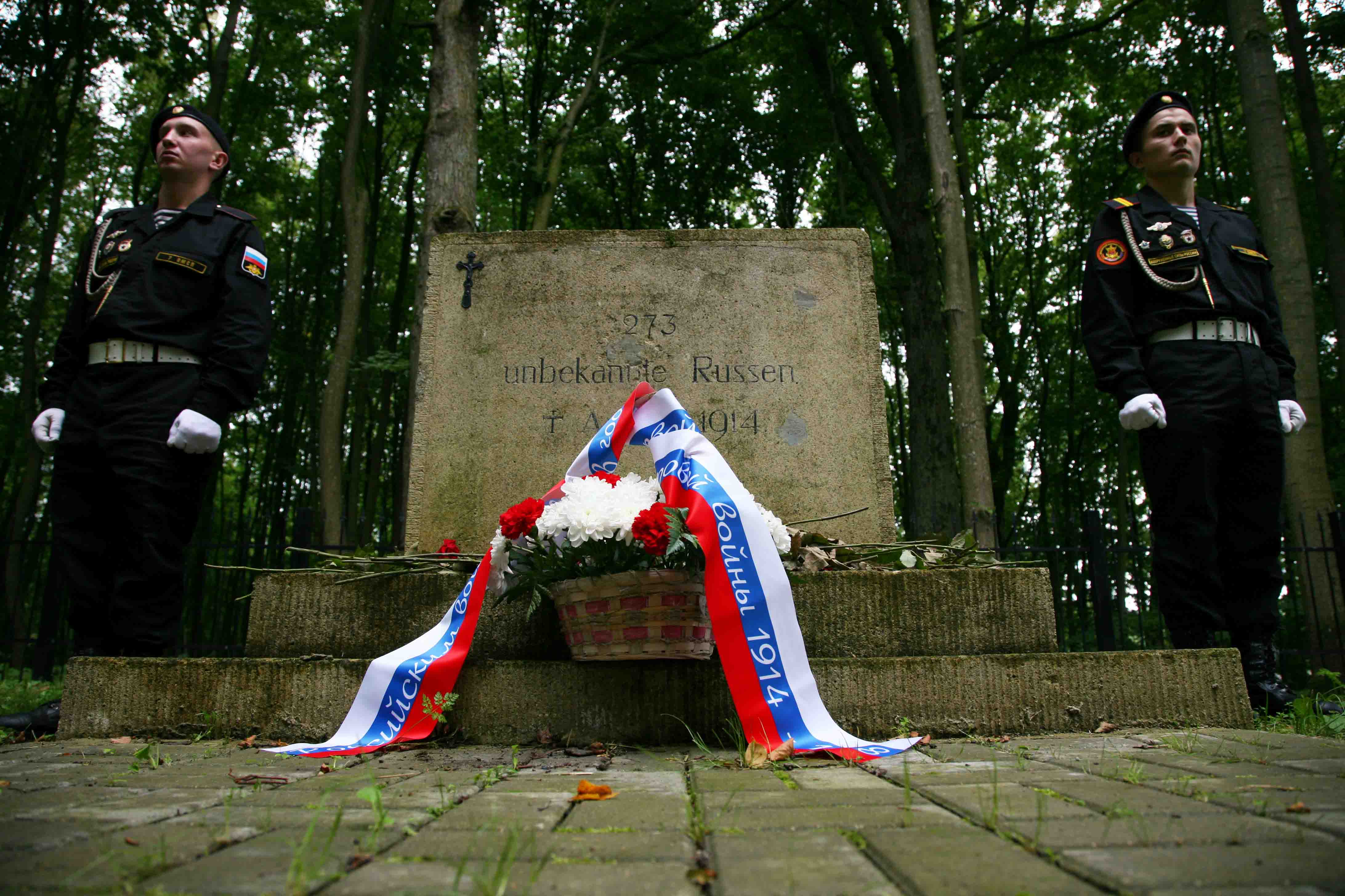 Памятные мероприятия на воинском мемориале "Маттишкемен" 6 августа 2016 года.